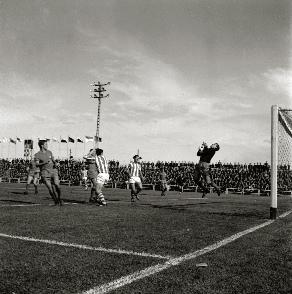 Título original: Partido Real Sociedad-Calvo Sotelo (8/27) Localización: Puertollano (Ciudad Real)